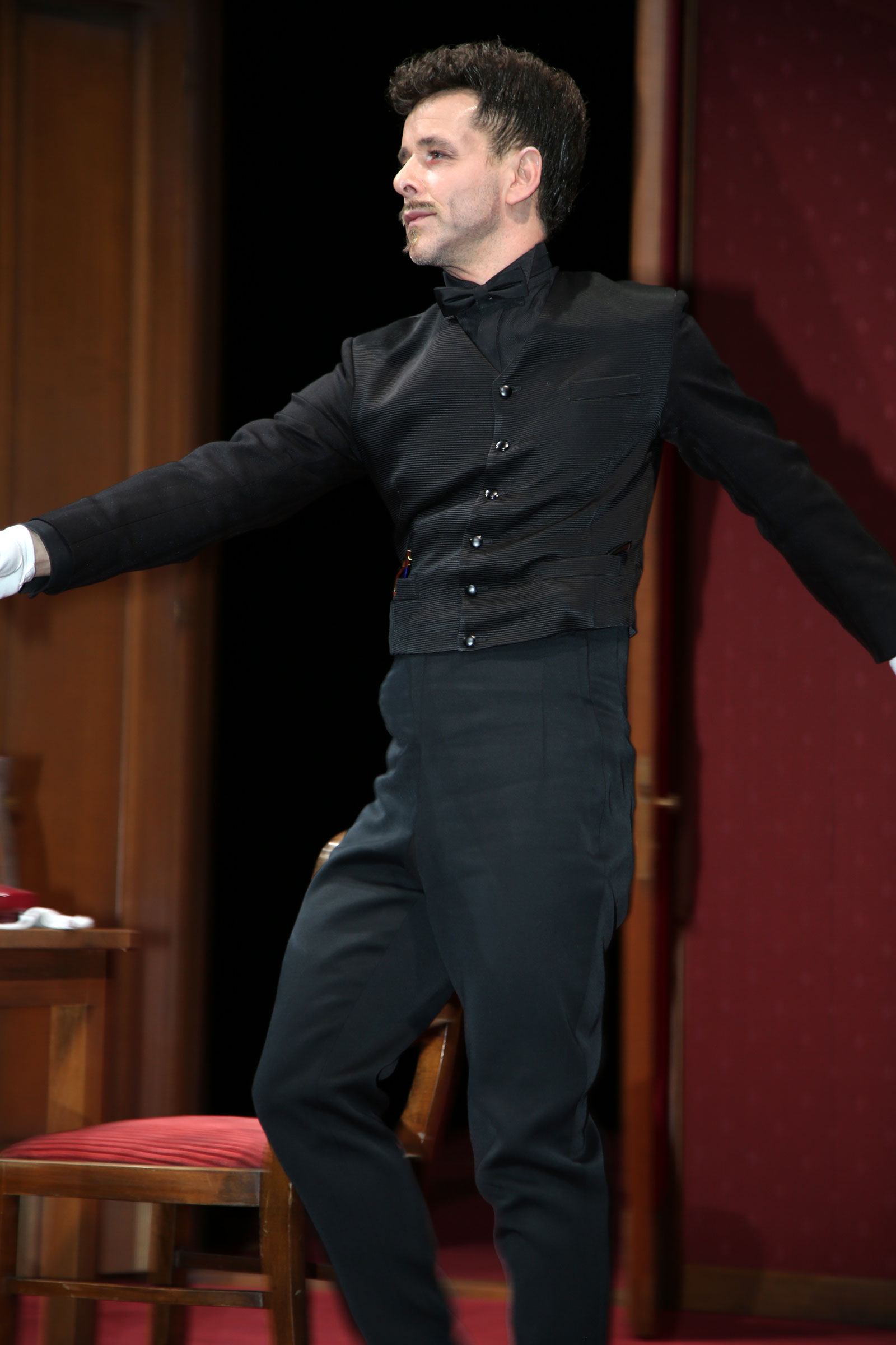 Meyer_Markus-9348